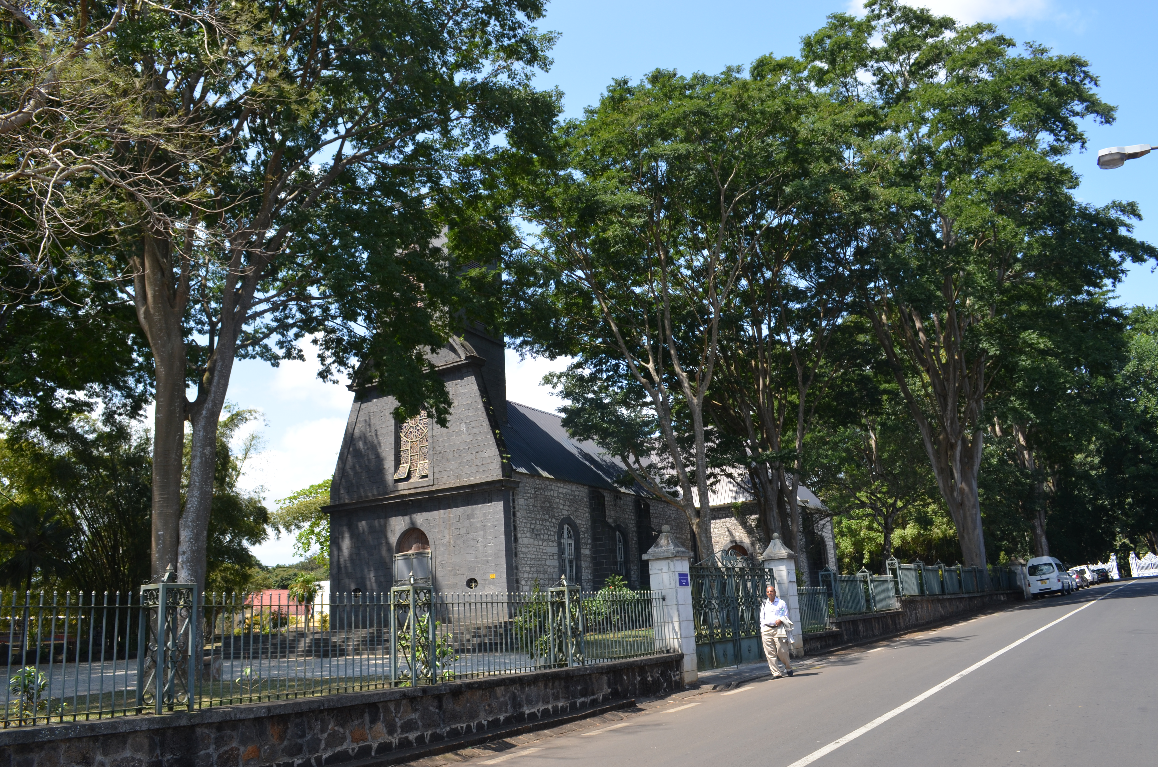 Pamplemousses, Eglise Saint François d‘Assise